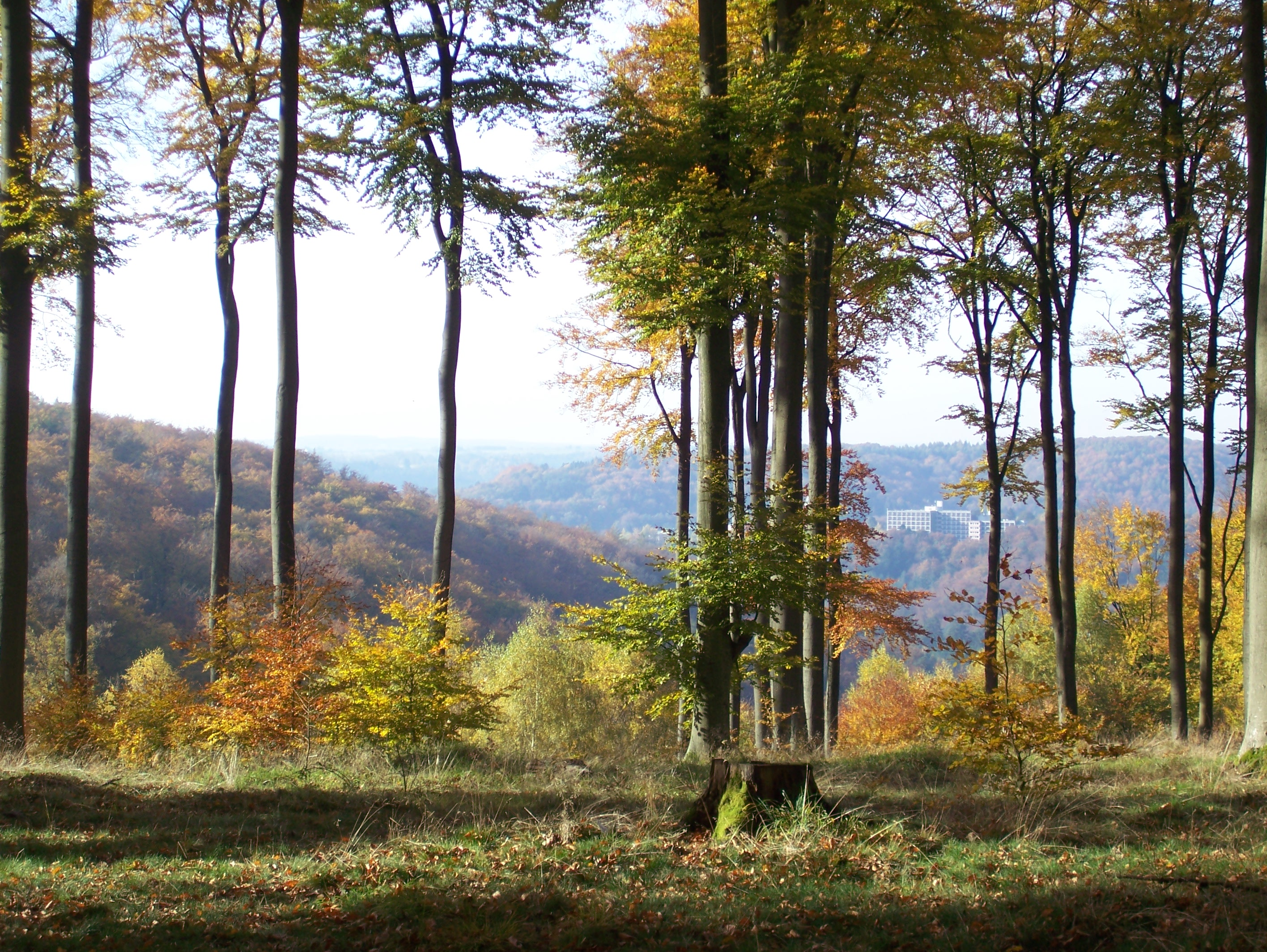 Wald bei Blieskastel-Lautzkirchen im Herbst